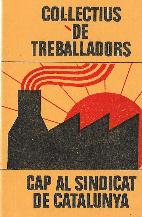 logo del sindicat CCTT figurant a la part davantera del carnet d'afiliació